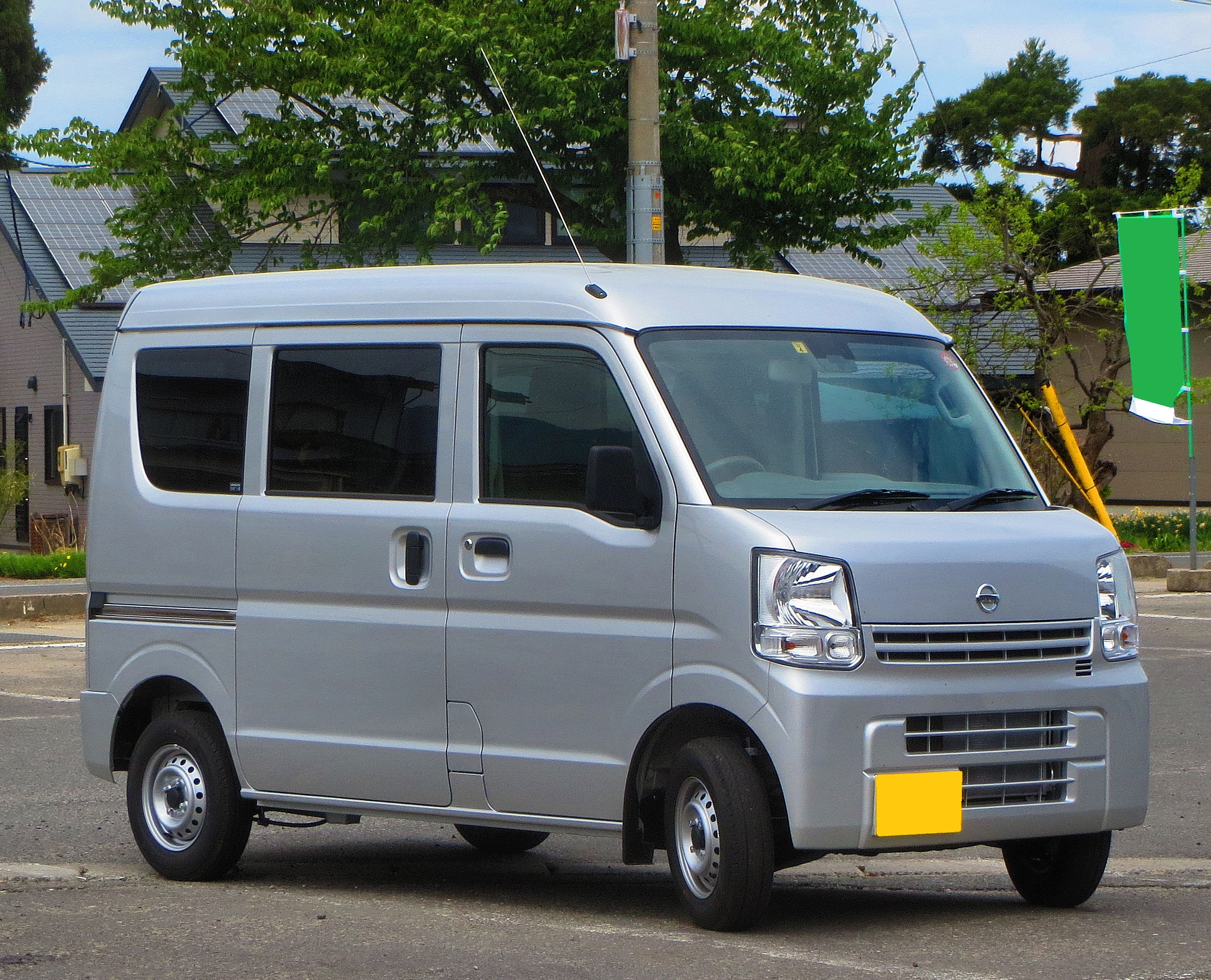 日産 NV100クリッパーDX GLパッケージ